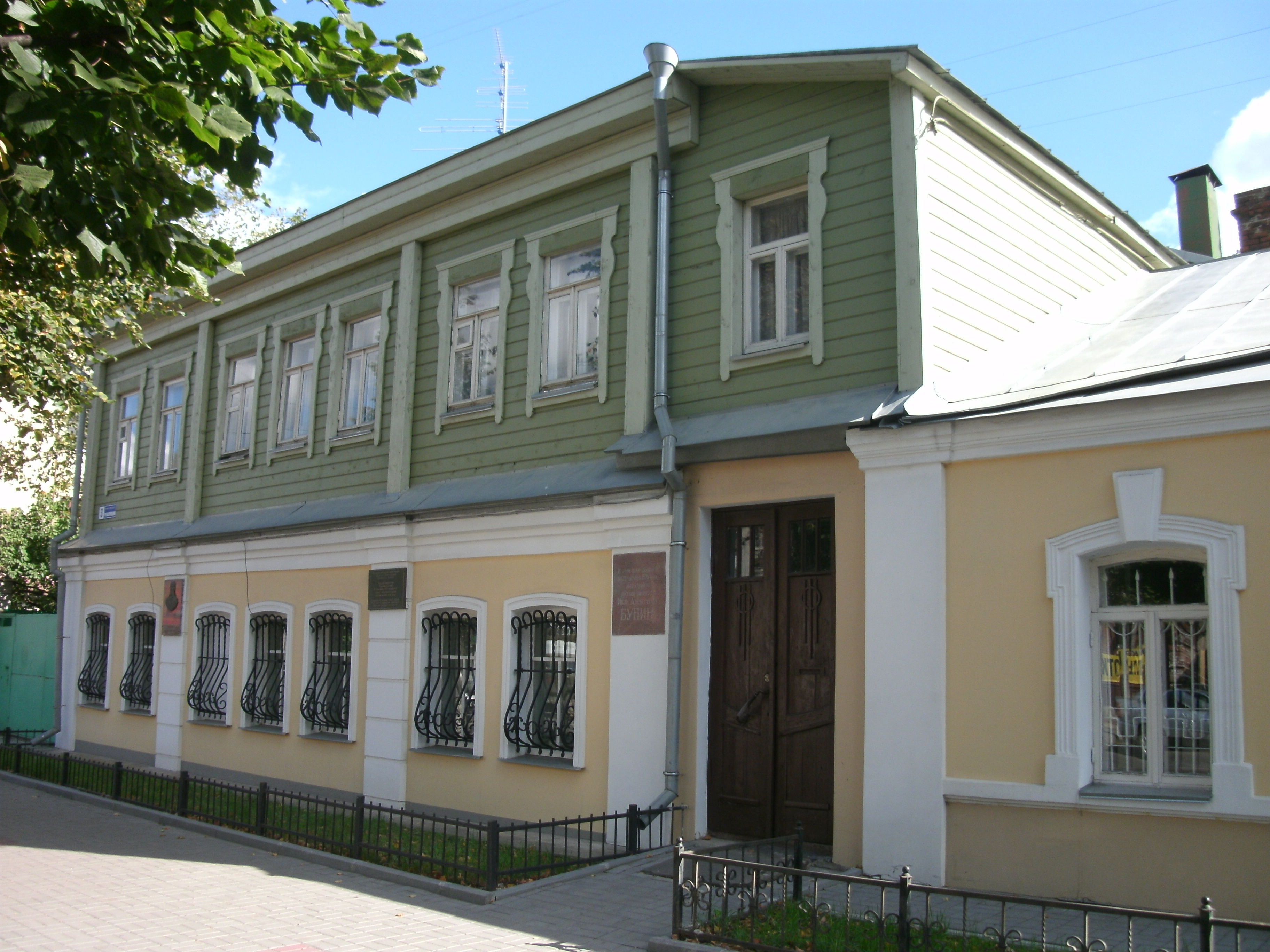 Усадьба Германовской в Воронеже, дом в котором родился Бунин